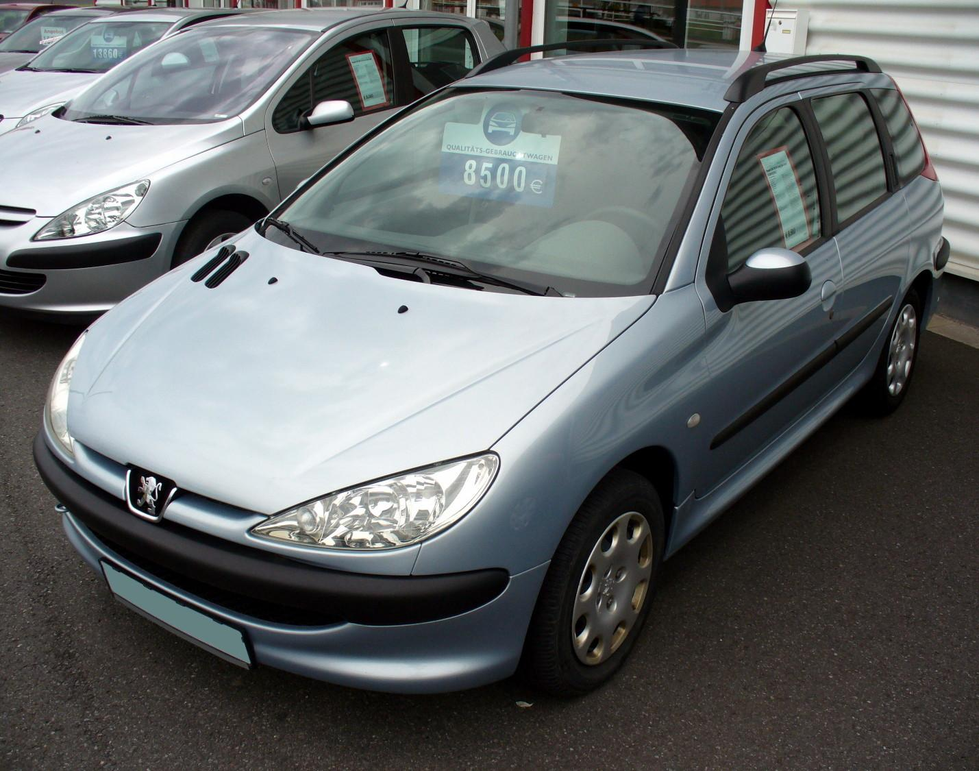 Peugeot 206 SW